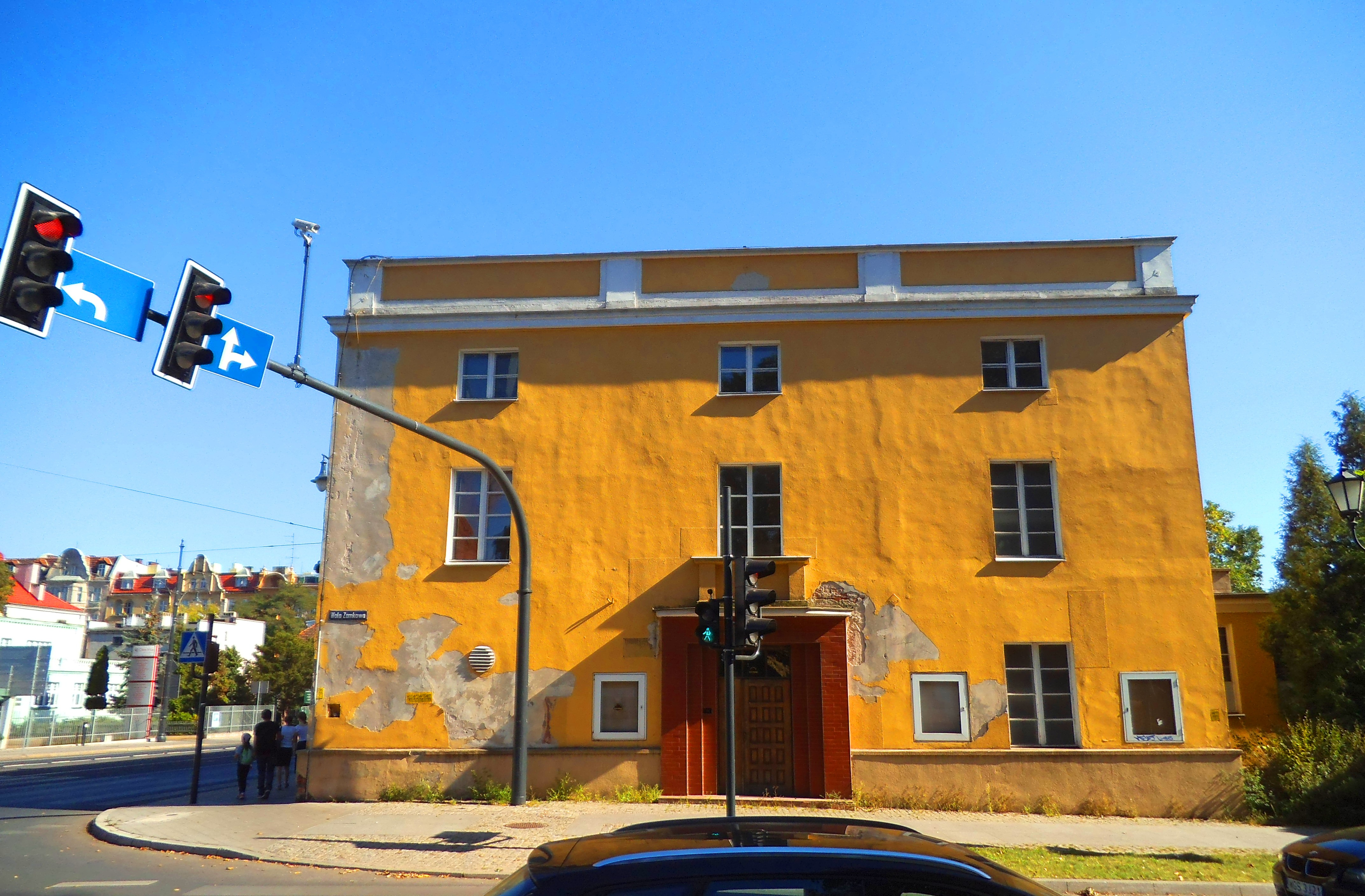 Dawny budynek Kinoteatru Grunwald w Toruniu